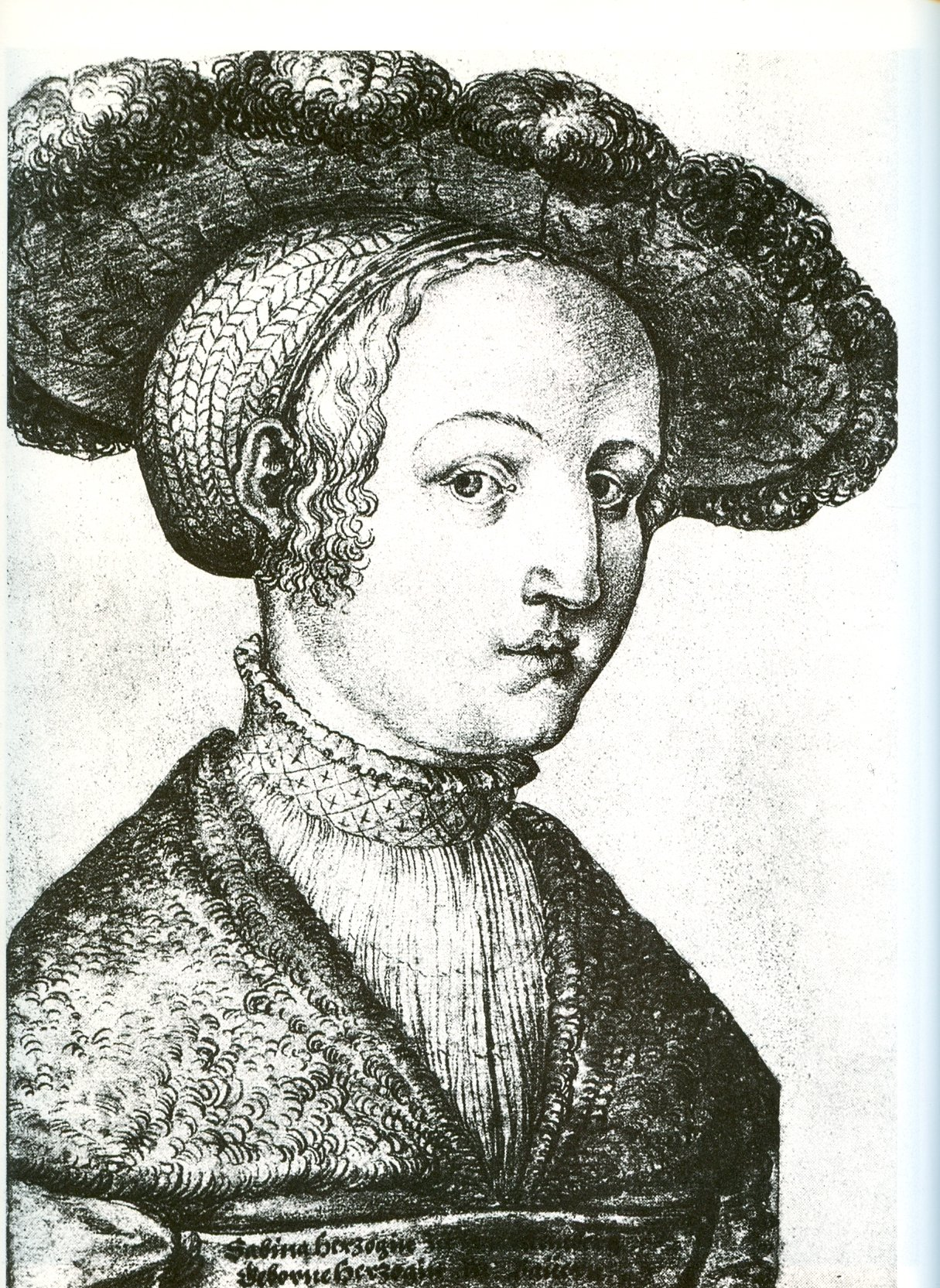 Herzogin Sabina von Bayern Gemahlin Herzog Ulrichs von Württemberg Kohlezeichnung Kupferstichkabinett Albertina, Wien